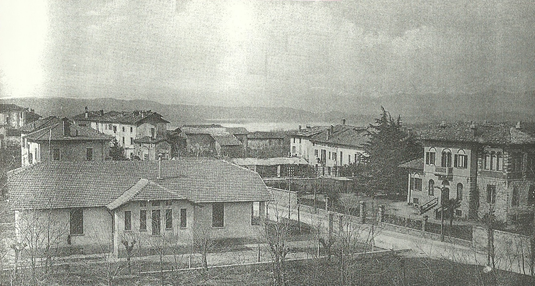 Bobbiate: panorama